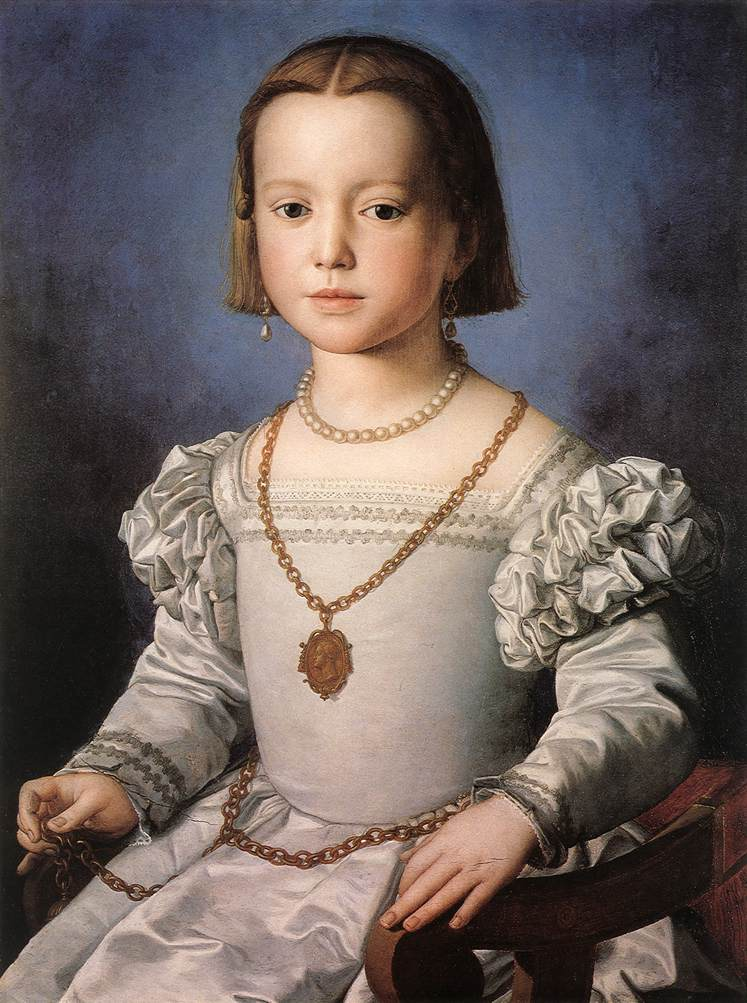 Bianca de' Medici (1536-1542), illegitimate daughter of Cosimo I de' Medici, Grand Duke of Tuscany